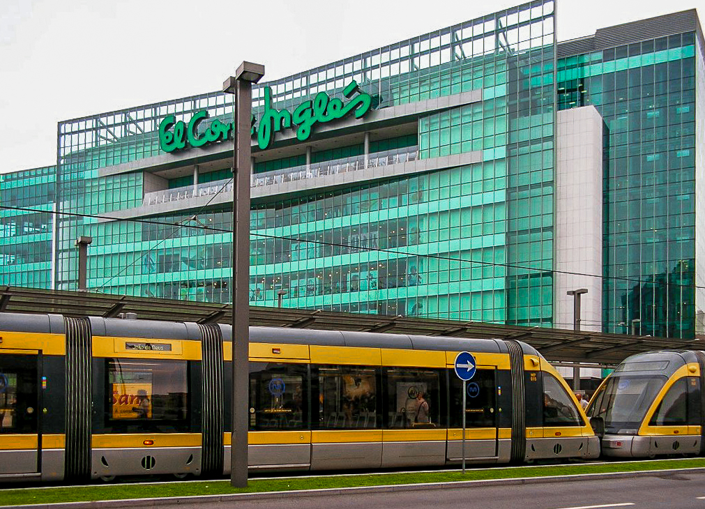 "El Corte Inglés" shopping mall in Vila Nova de Gaia, Portugal.